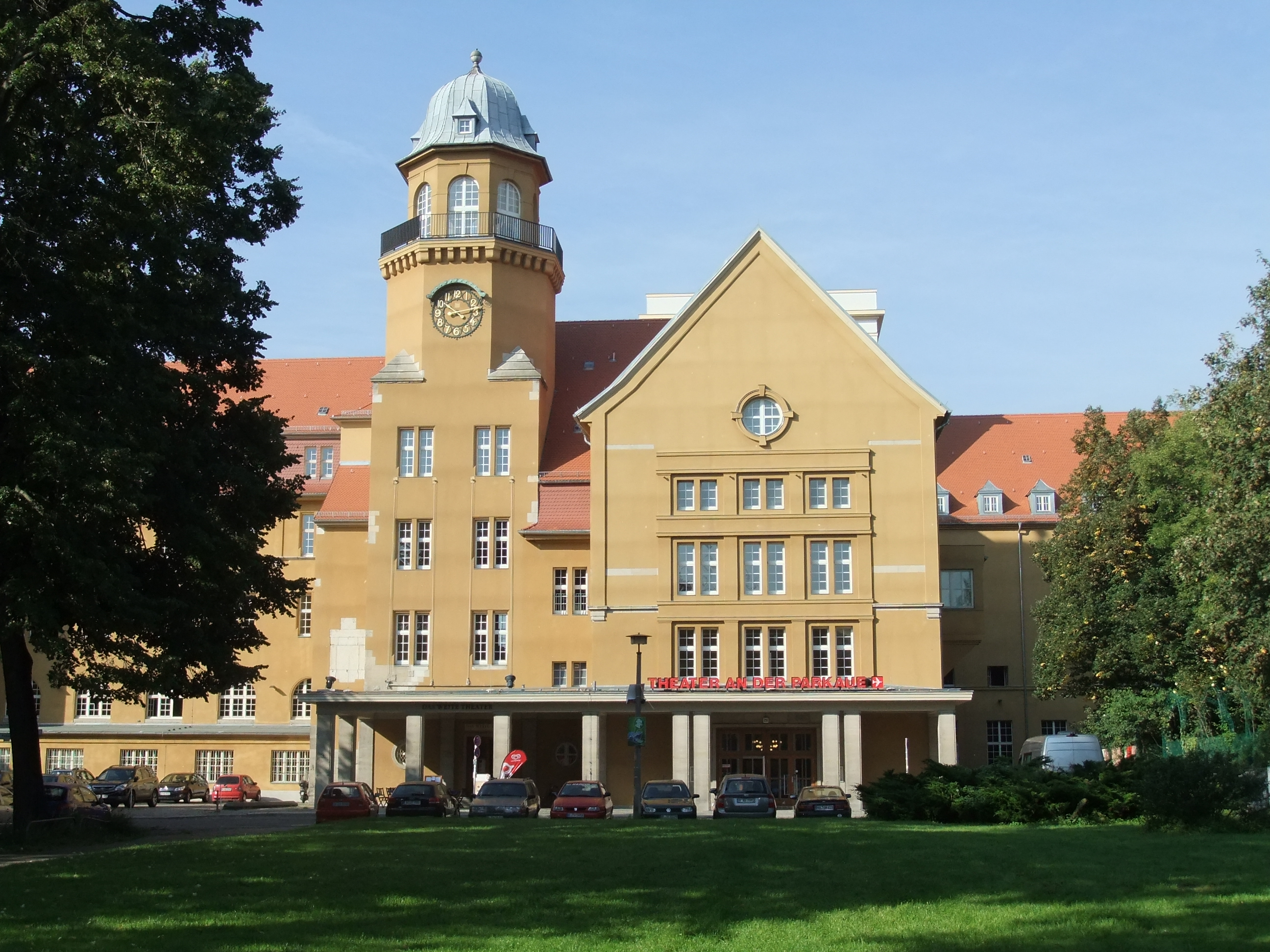 Denkmalliste Berlin OBJ-Dok-Nr.: 09040260 - Berlin Lichtenberg Parkaue 25/29, Haus der Kinder, Caroussel-Theater an der Parkaue, Schule,1910-11, Umbau um 1950 von W. Adler und W. Heinrichs (Baudenkmal, Bestandteil des Ensembles Parkaue Denkmalliste Berlin OBJ-Dok-Nr.: 09040222)